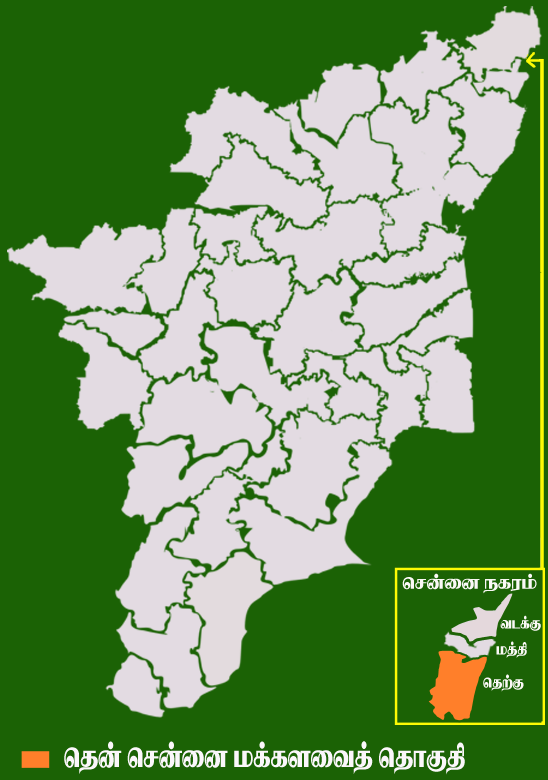 தமிழக வரைபடத்தில் உள்ள தென் சென்னை மக்களவைத் தொகுதி